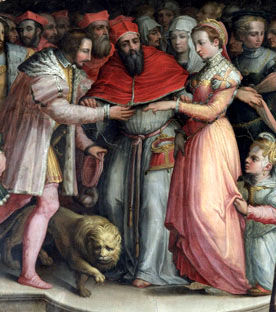 Fresque représentant le mariage d'Henri II et de Catherine de Medicis